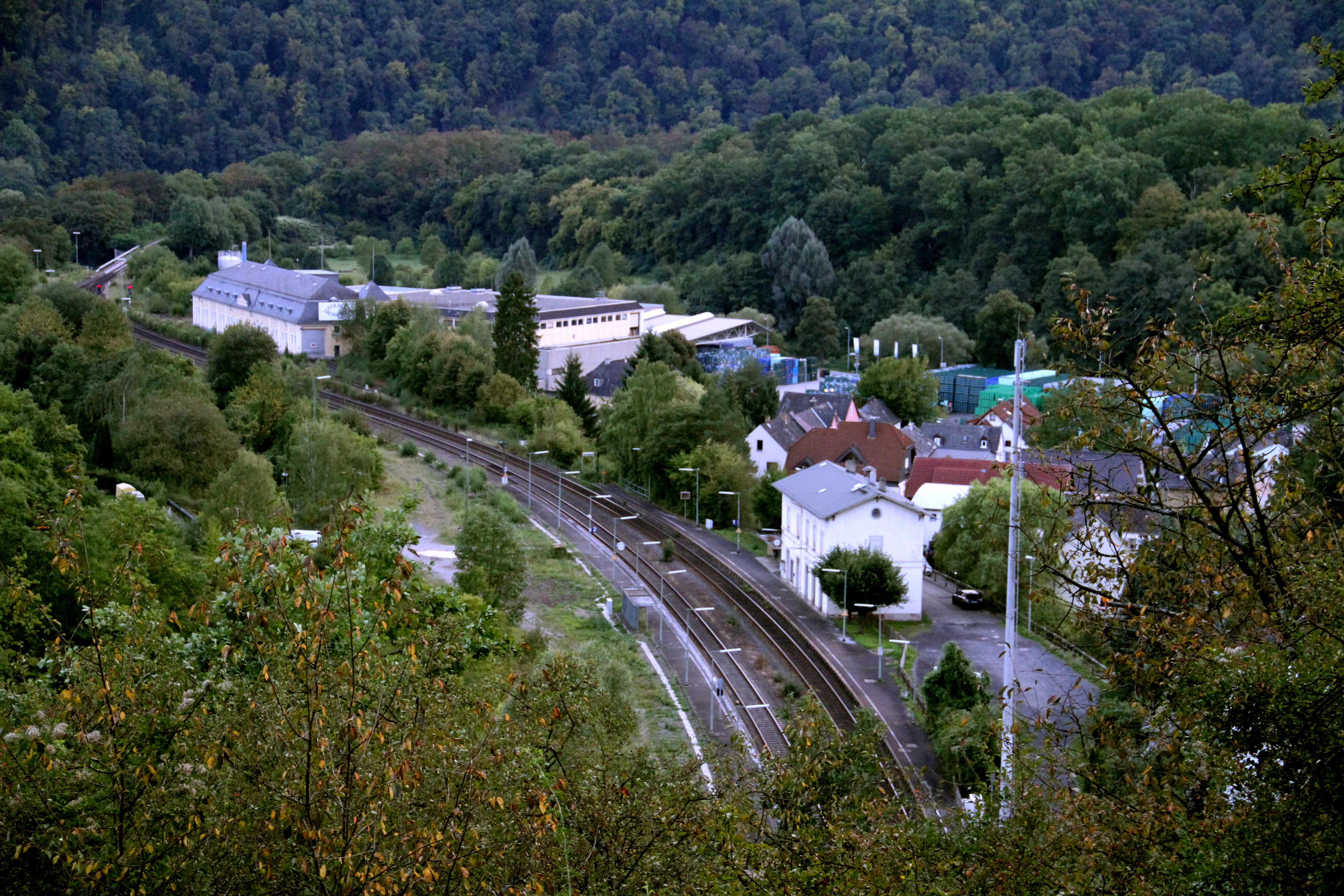 Blick auf Fachingen, im Vordergrund der Bahnhof und die Lahntalbahn